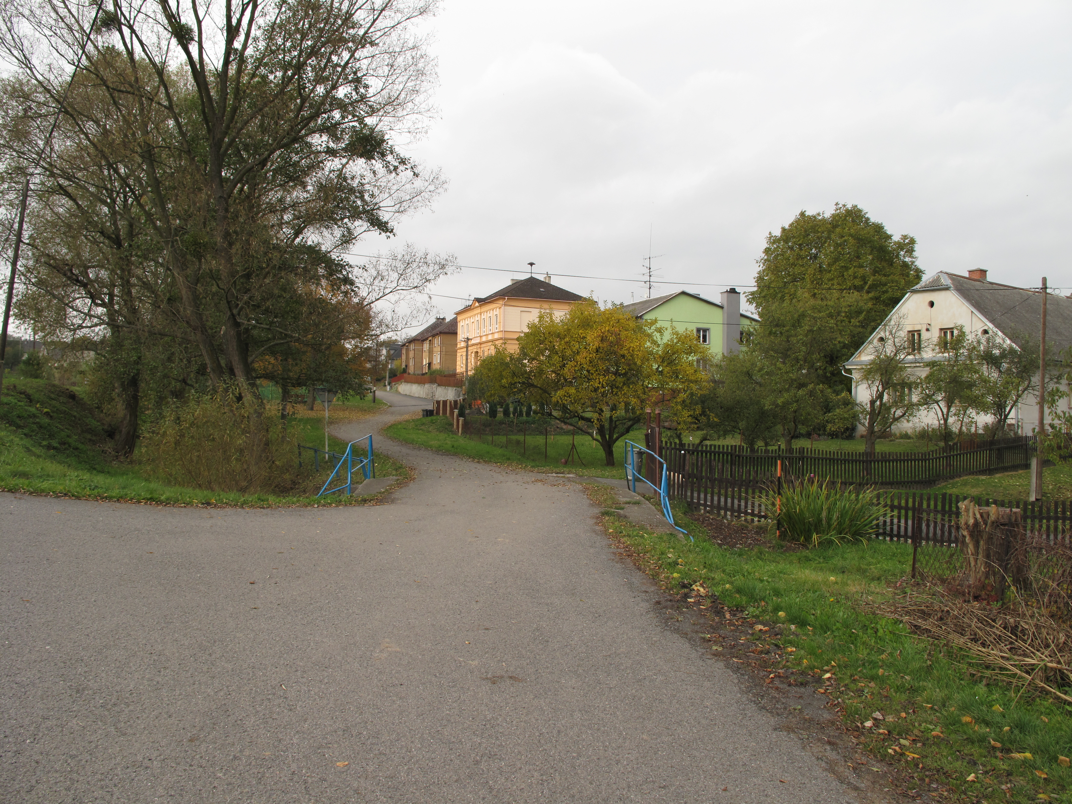 Bohdanovice. Okres Opava, Česká republika.